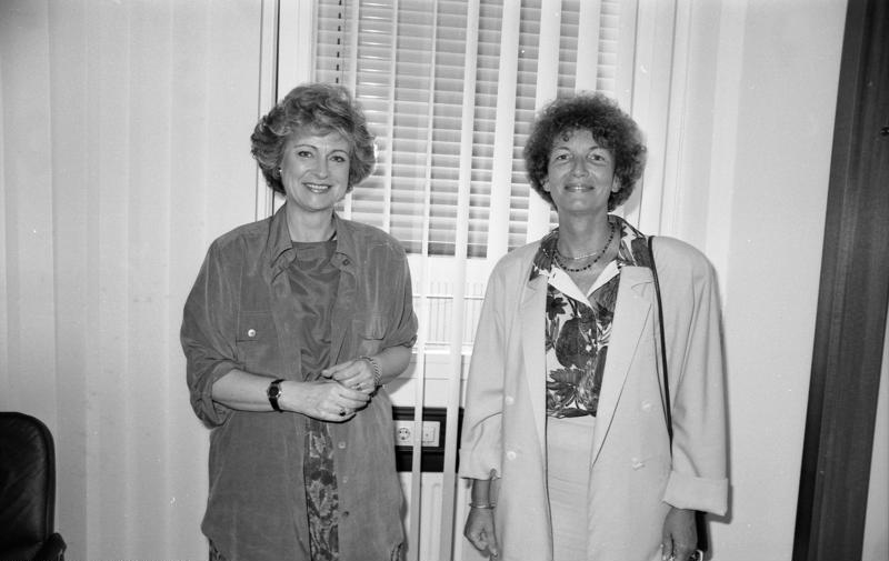 Bonn, 9.7.1991 Die Parlamentarische Staatssekretärin beim Bundesminister für wirtschaftliche Zusammenarbeit, Michaela Geiger, empfing die Außenministerin der Seychellen, Danielle de Saint Jorre, zu einem Informationsgespräch im Bundesministerium für wirtschaftliche Zusammenarbeit.